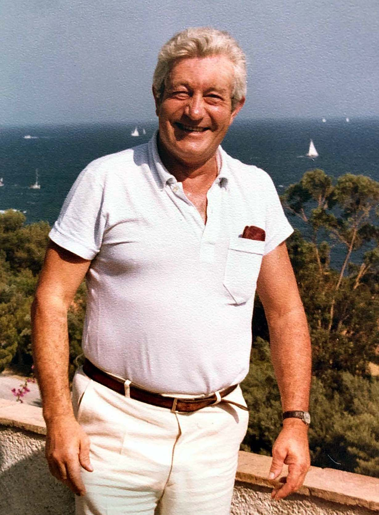 photo de J Manière en fin de carrière